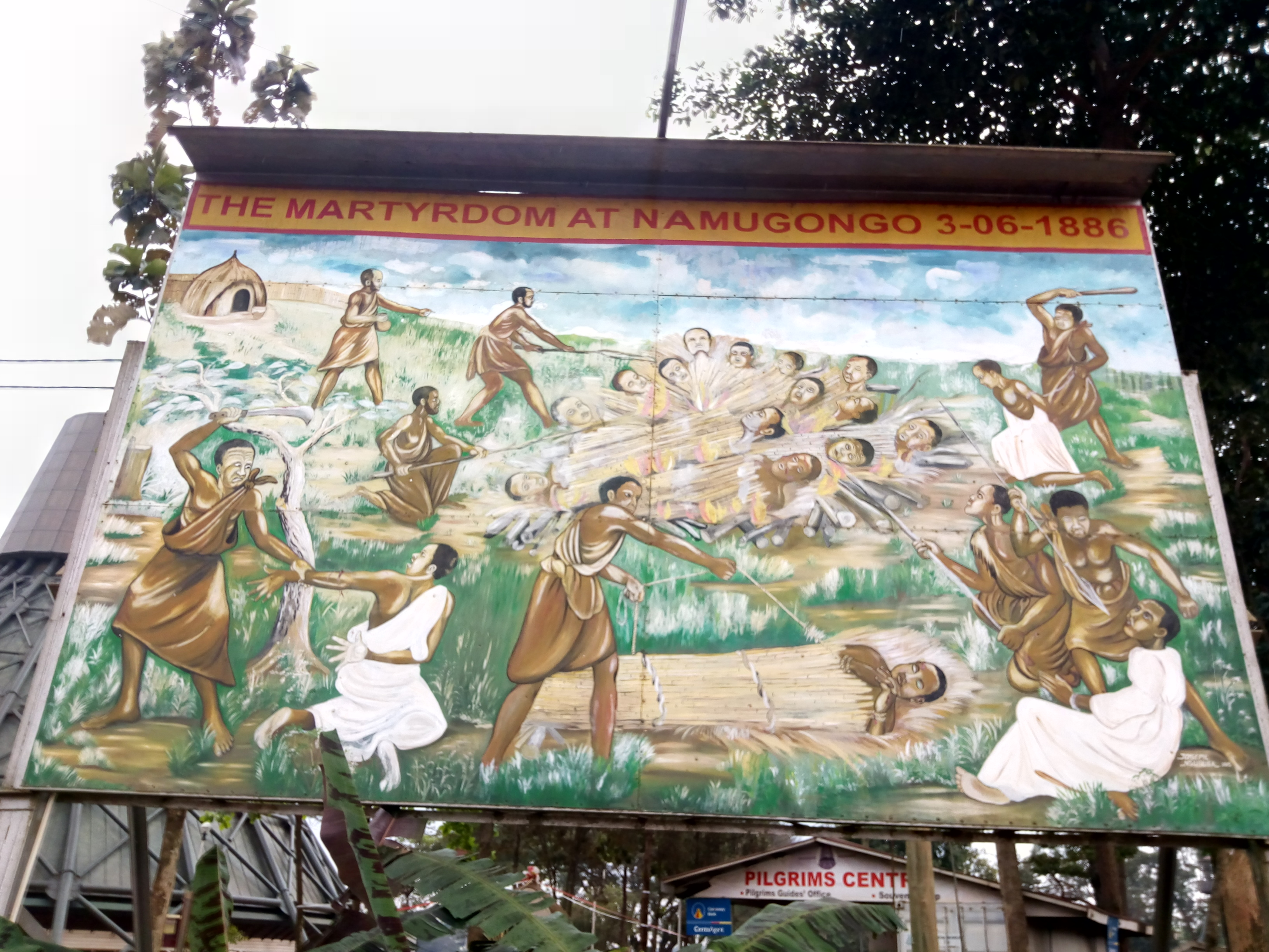 Kiswahili: Muonekano wa namna / jinsi Mashahidi wa Uganda walivyo teswa.